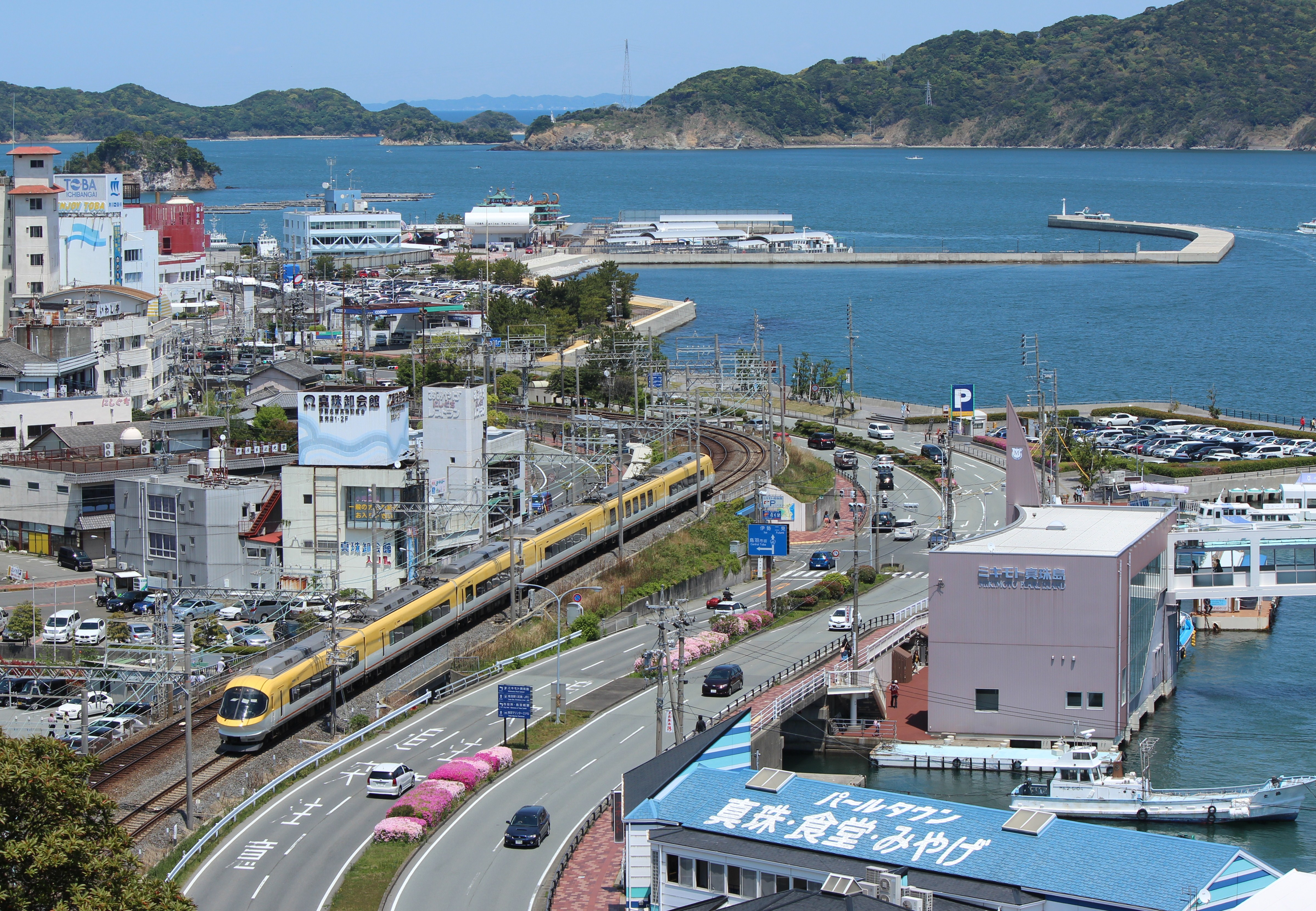 近鉄23000系更新車